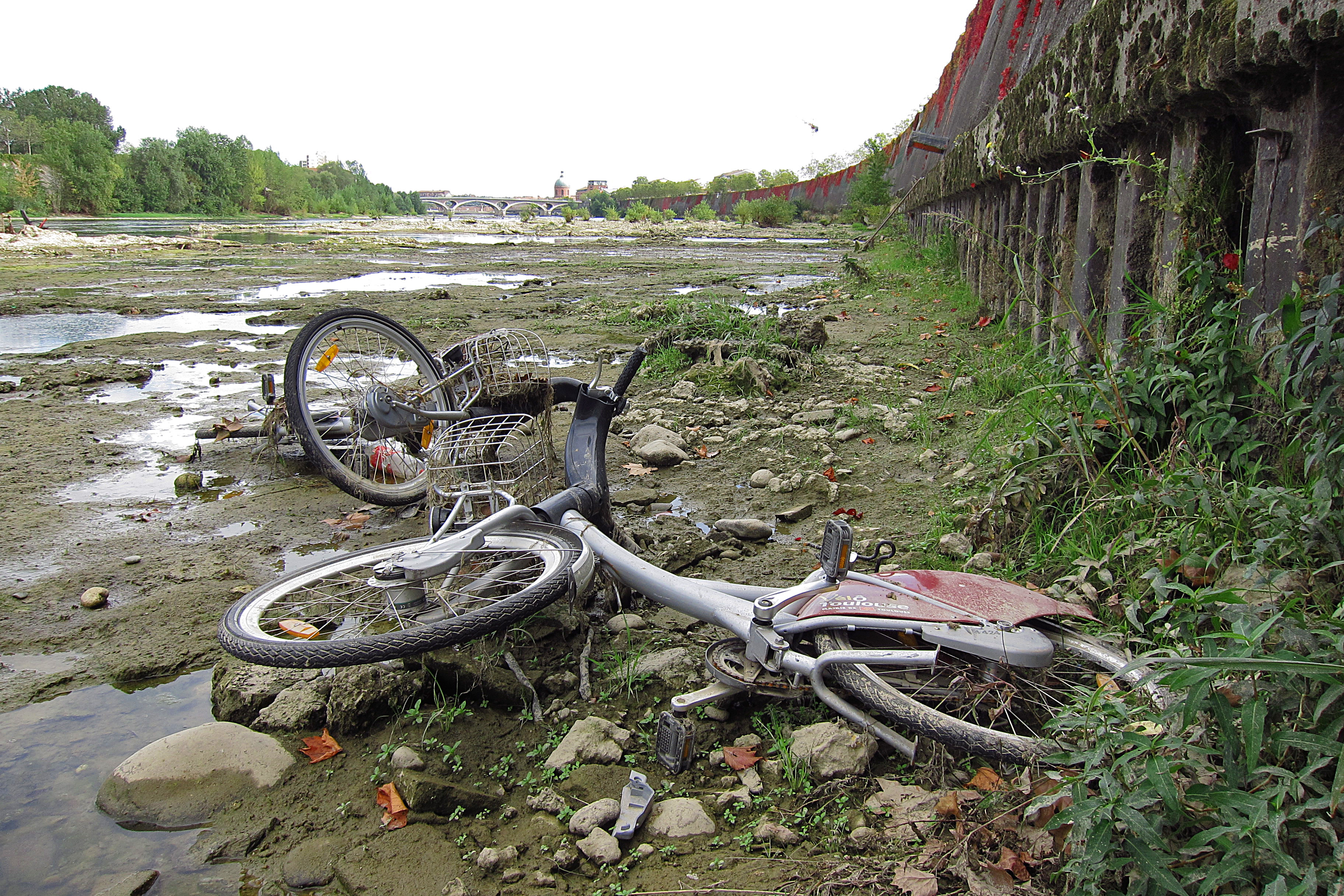 Toulouse (Haute-Garonne, Midi-Pyrénées, France) : Vélos jetés dans la Garonne.